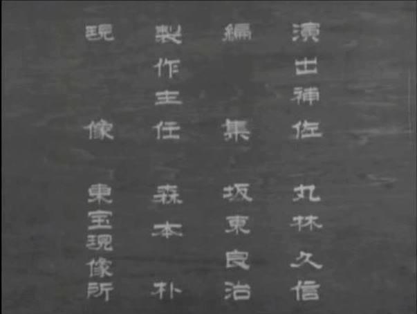 『大岡政談 将軍は夜踊る』、1950年、カットタイトル